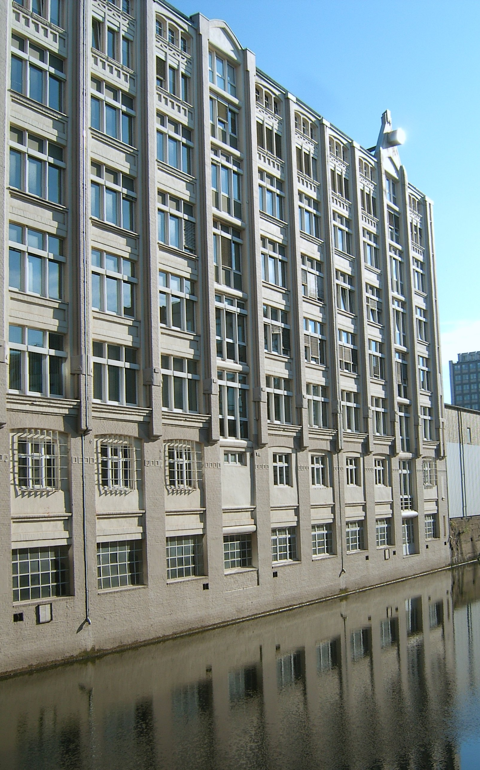 Speicher in Hammerbrook